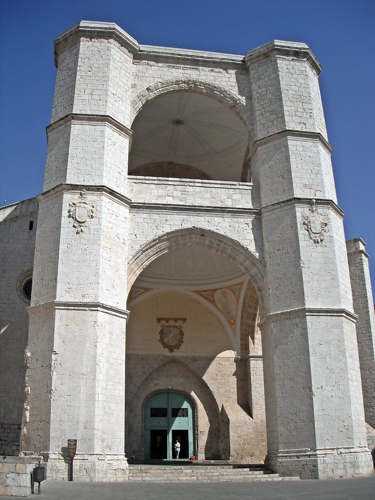 Iglesia del monasterio de San Benito el Real (Valladolid)